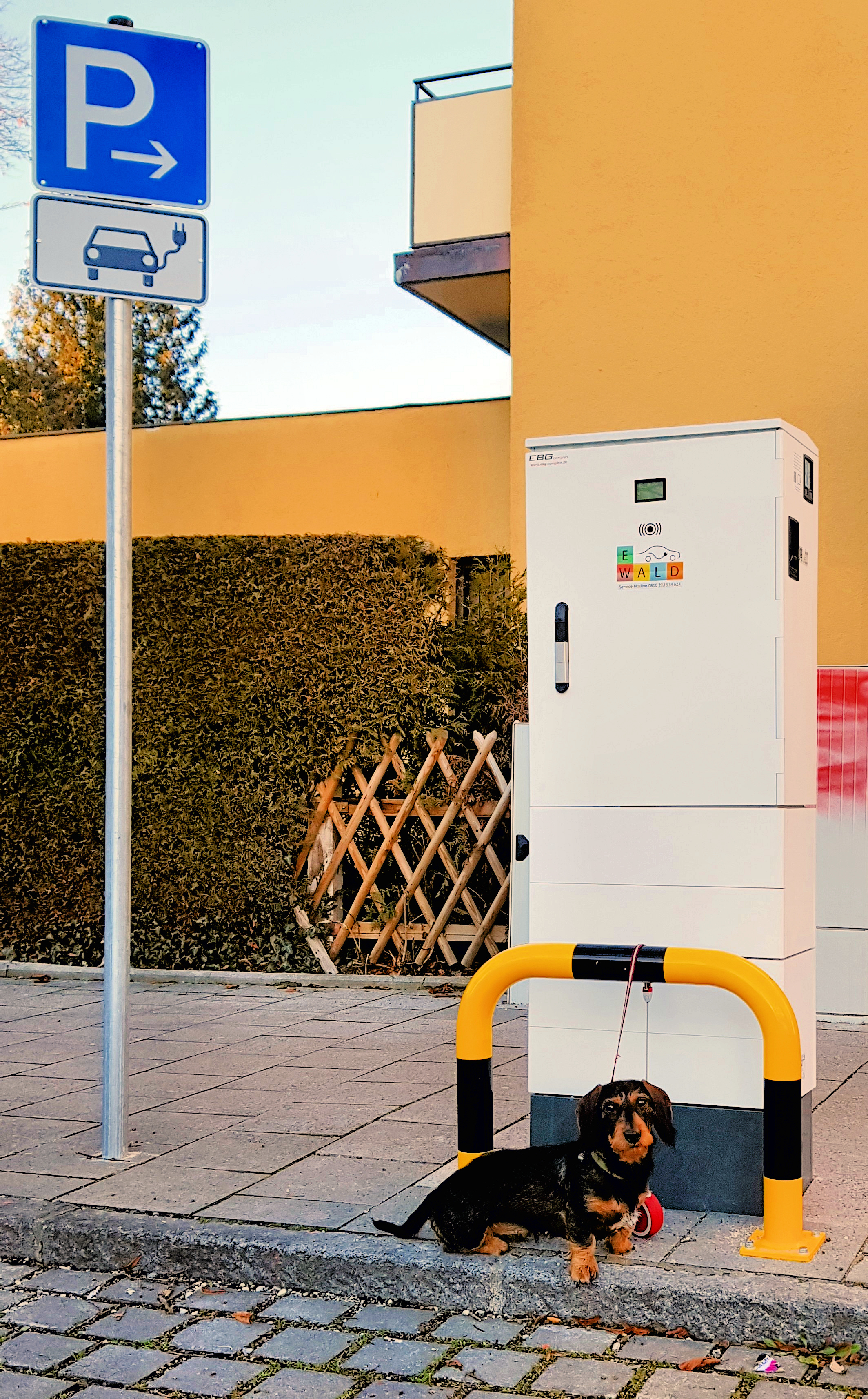 Deutschland, Bayern, Oberbayern, Landkreis Fürstenfeldbruck, Gemeinde Gröbenzell, Ladestation für eFahrzeuge in der Rathausstraße seit Dezember 2019